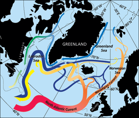 北大西洋洋流示意图